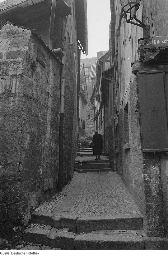 Original image description from the Deutsche Fotothek Quedlinburg. Blick durch eine Fachwerkgasse